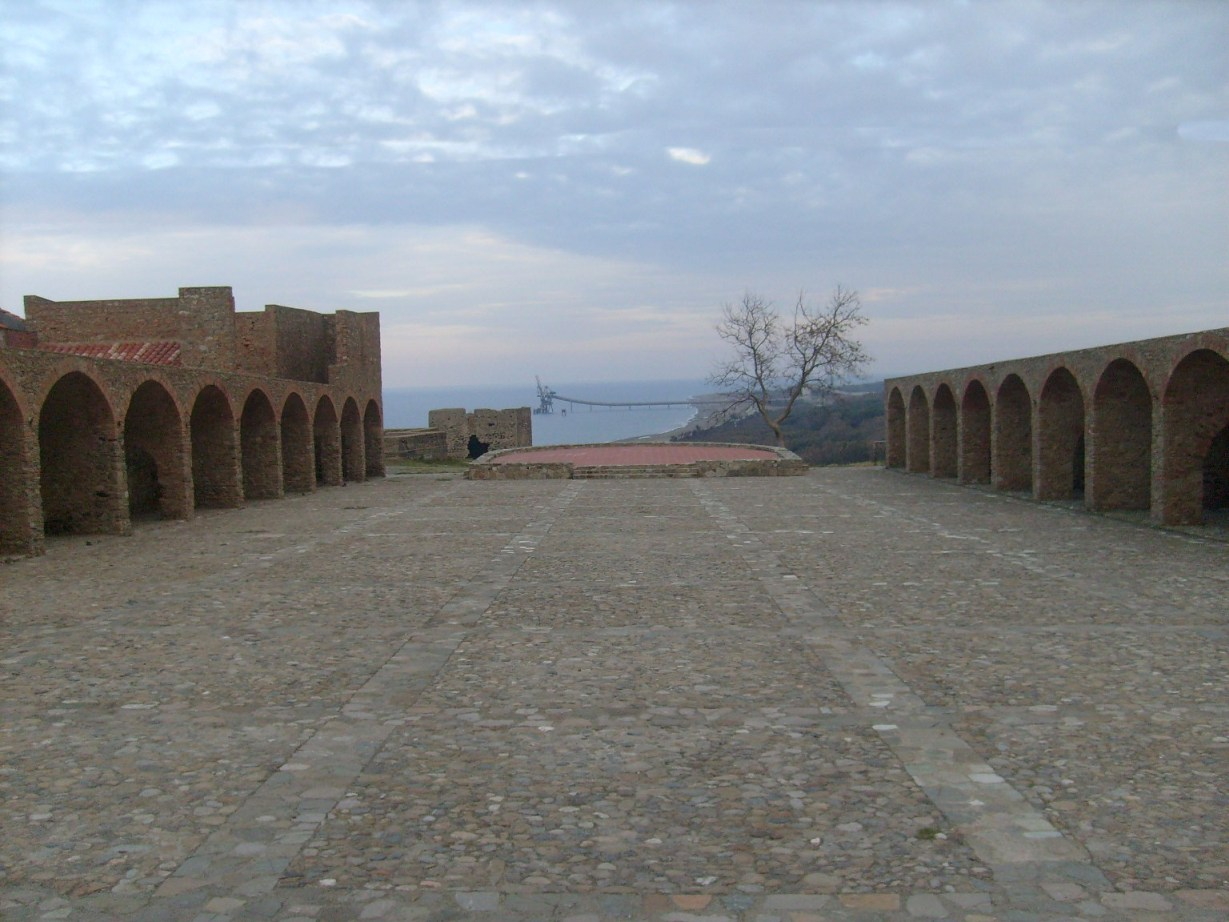 Autore: Marco Parrilla